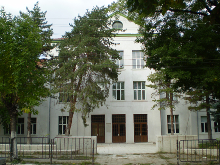 Прогимназия "Св. Кличент Охридски" - Бяла Слатина